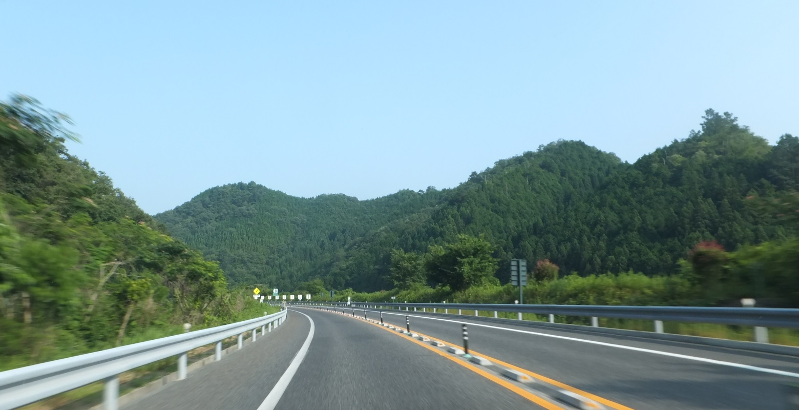 兵庫県たつの市新宮町角亀 播磨自動車道